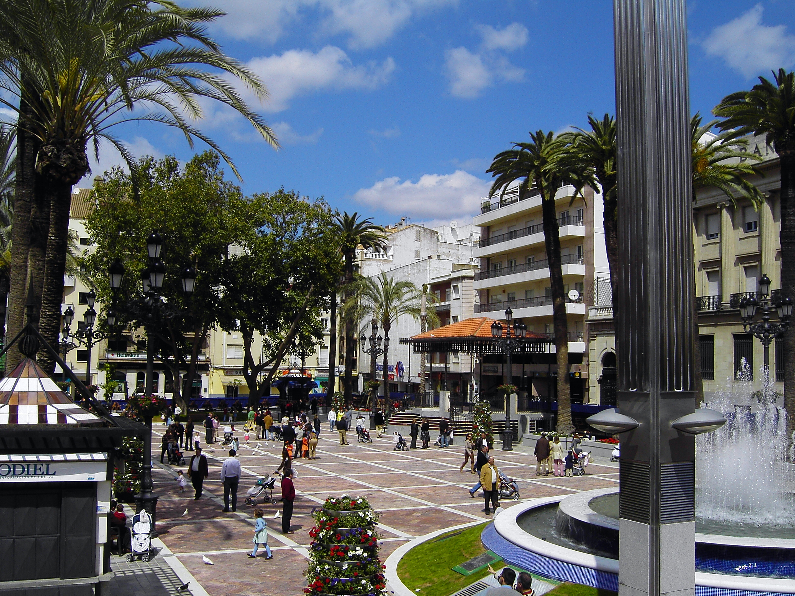 Plaza de las Monjas, Huelva